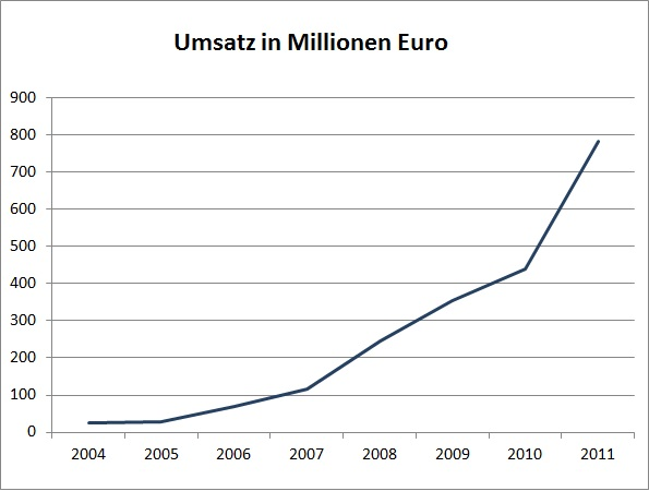 Umsatzentwicklung Schoeller Münzhandel